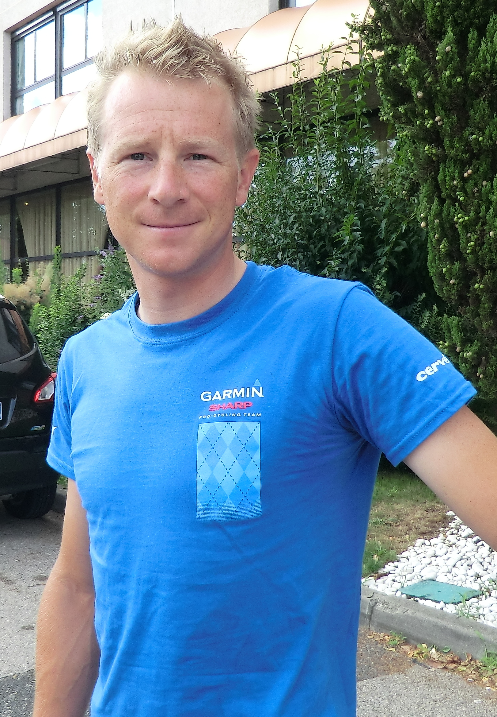 Coureur/directeur sportif au départ de l'hôtel : étape 1 du Tour de l'Ain 2013.